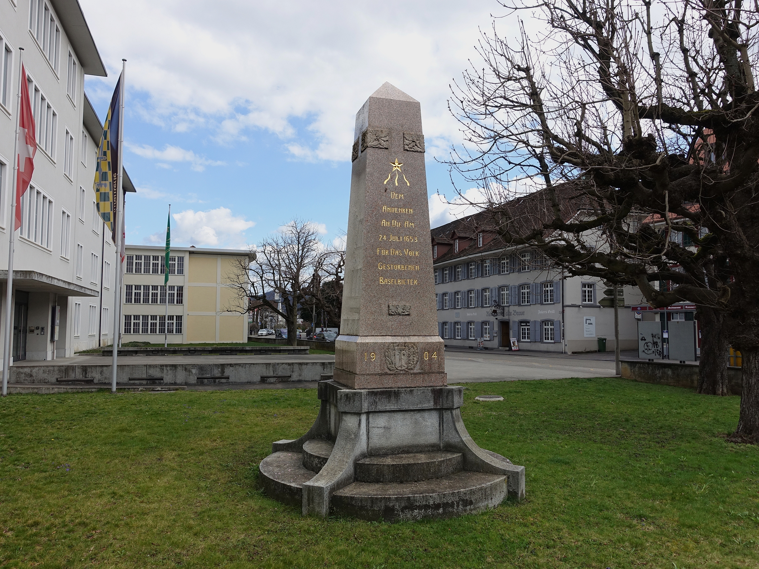 Obelisk-Bauernkriegsdenkmal von 1904, vor der Kaserne in Liestal, Schweiz. Inschrift, Dem Andenken an die am 24. Juli 1653 für das Volk gestorbenen (Hingerichteten!) Baselbieter. Inschrift auf der anderen Seite. Uli Schad von Oberdorf, Hans Gysin von Liestal, Uli Gysin Läufelfingen, Galli Jenny von Langenbruck, Joggi Mohler von Diegten, Konrad Schuler von Liestal, Heinrich Stutz von Liestal. Unterdrückt aber nicht überwunden. Errichtet vom Volk von Baselland 1904.